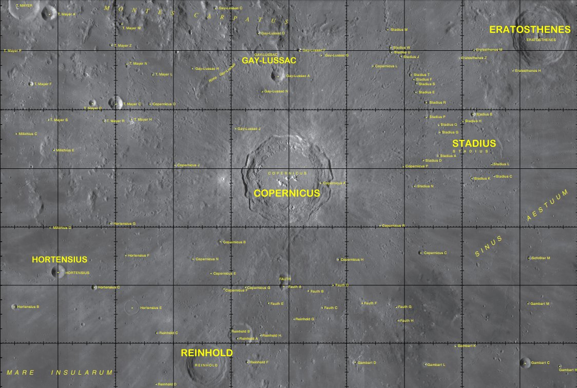 Cráter Copernicus. Localización (LRO)